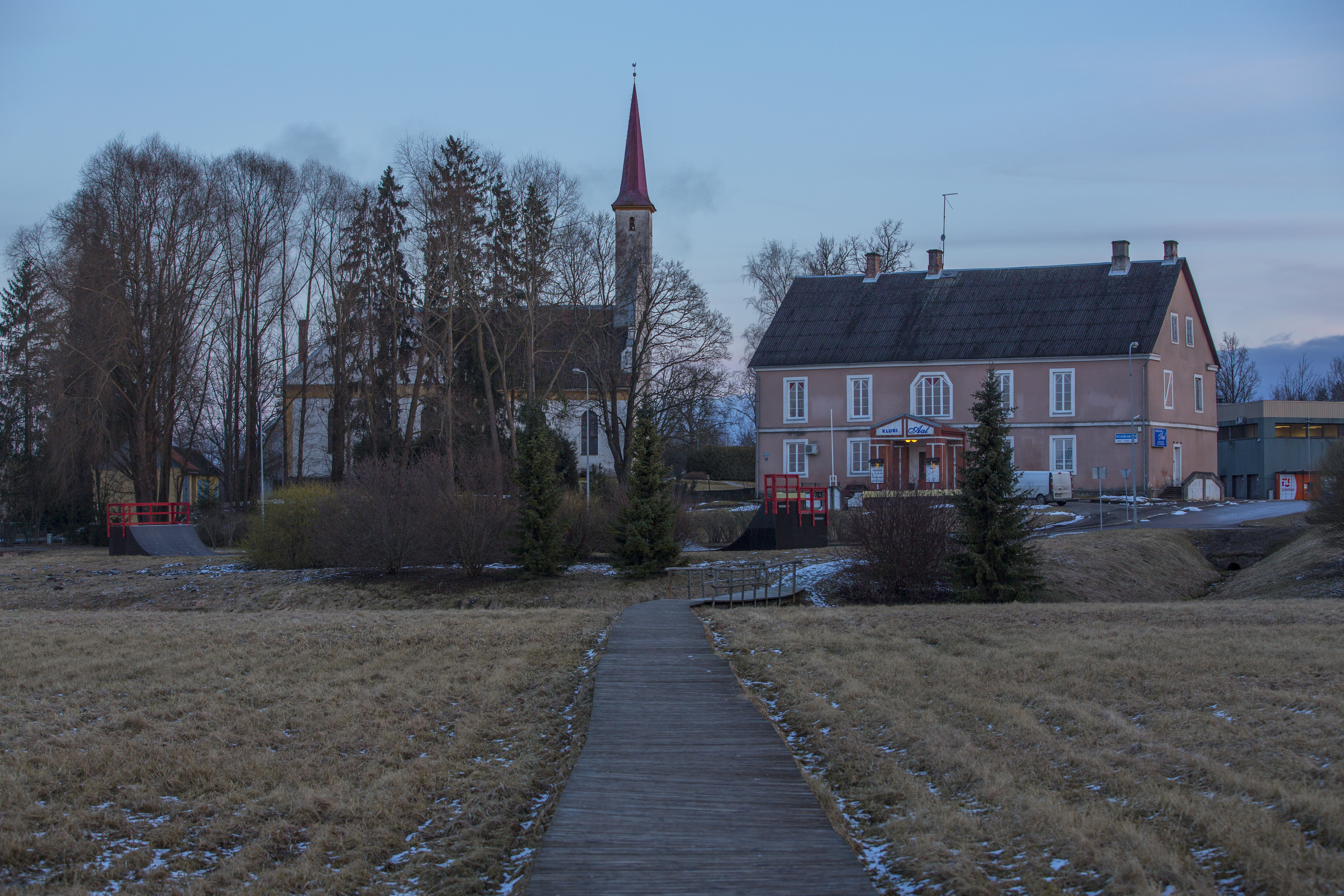 Пылва, Эстония